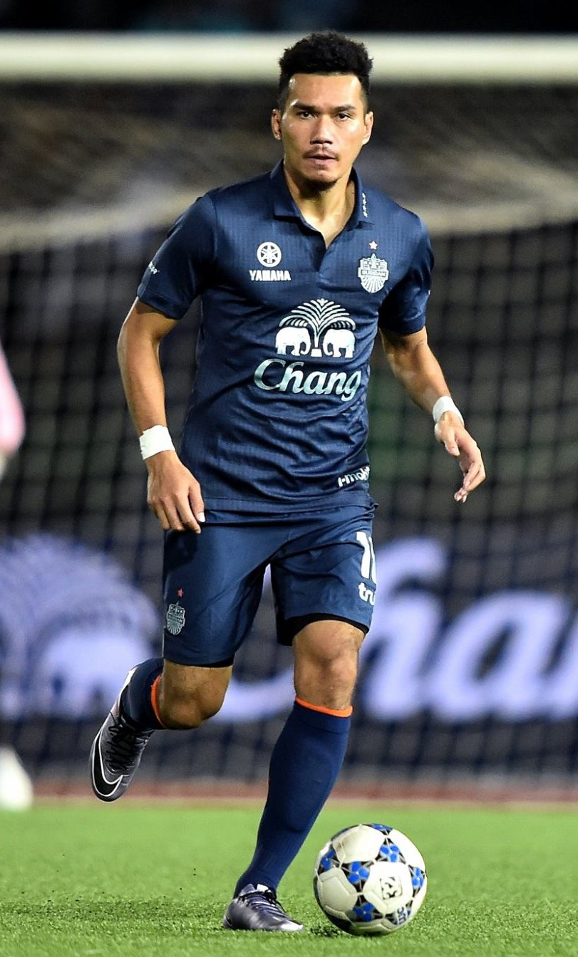 Koravit